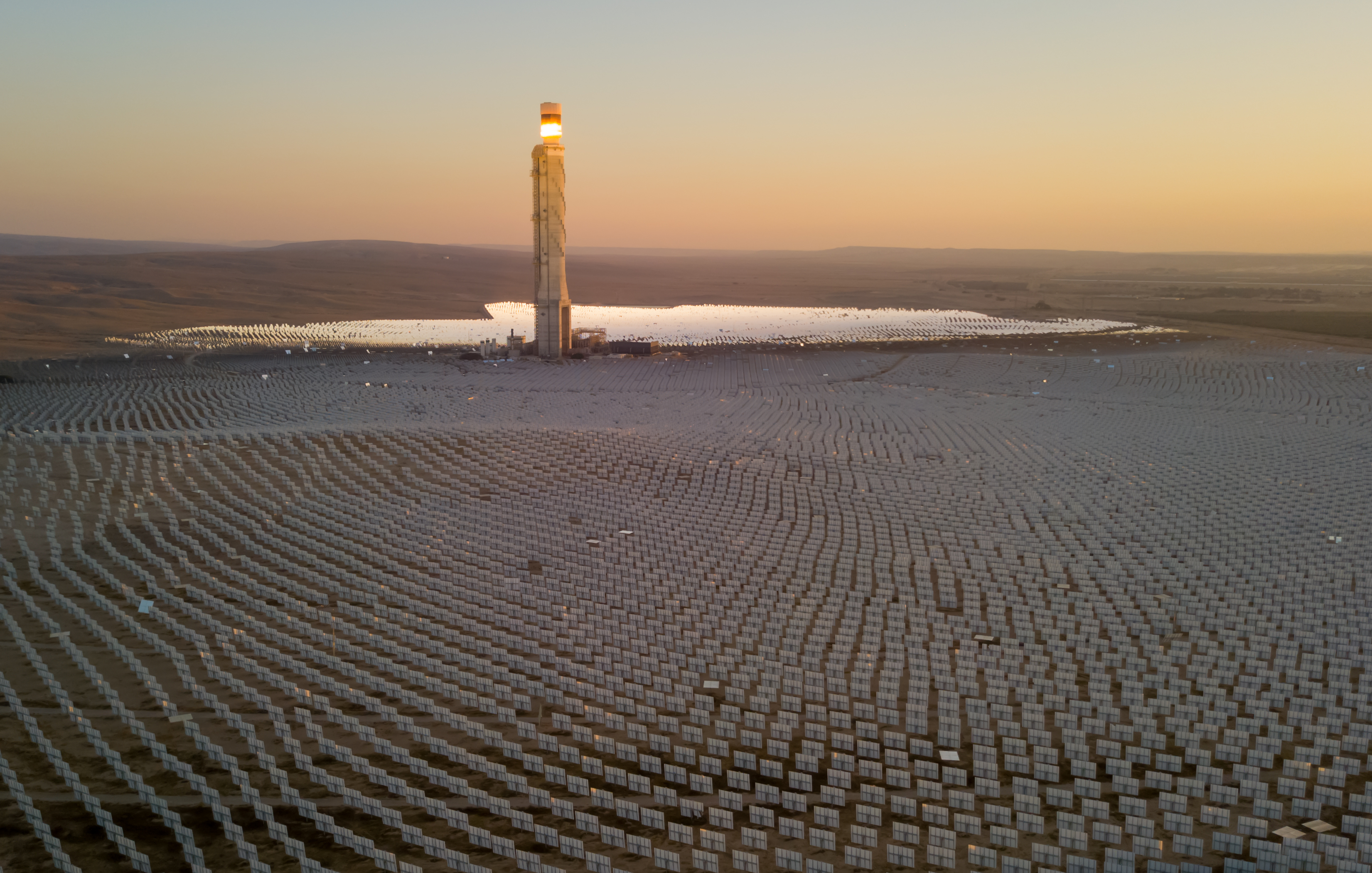 תמונה מהאביר